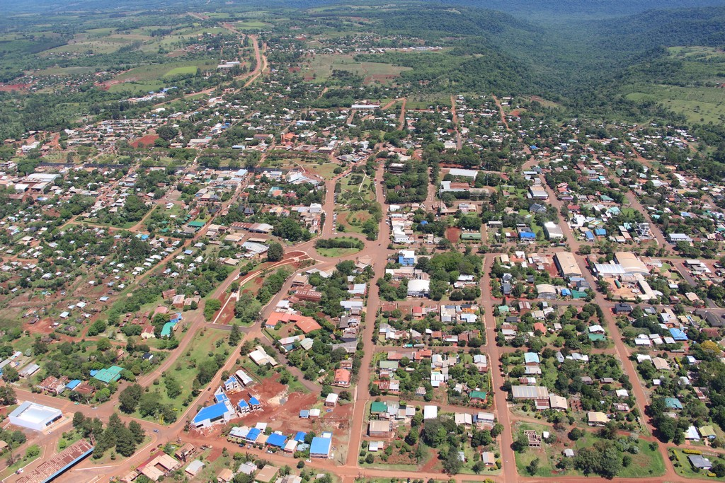 Vista aérea de la localidad de Aristóbulo del Valle, Misiones, Argentina.